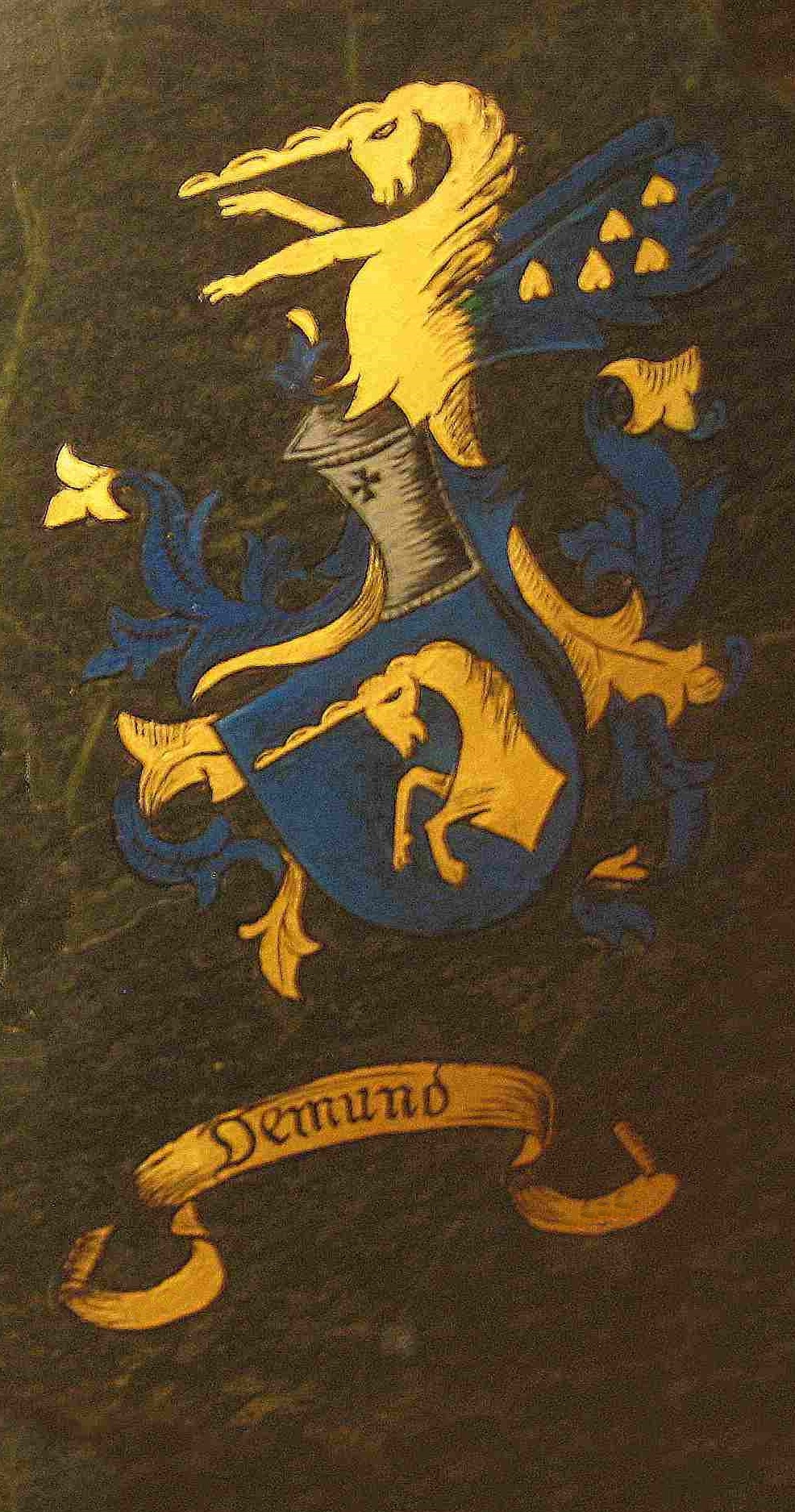 Wappen der Familie Demund